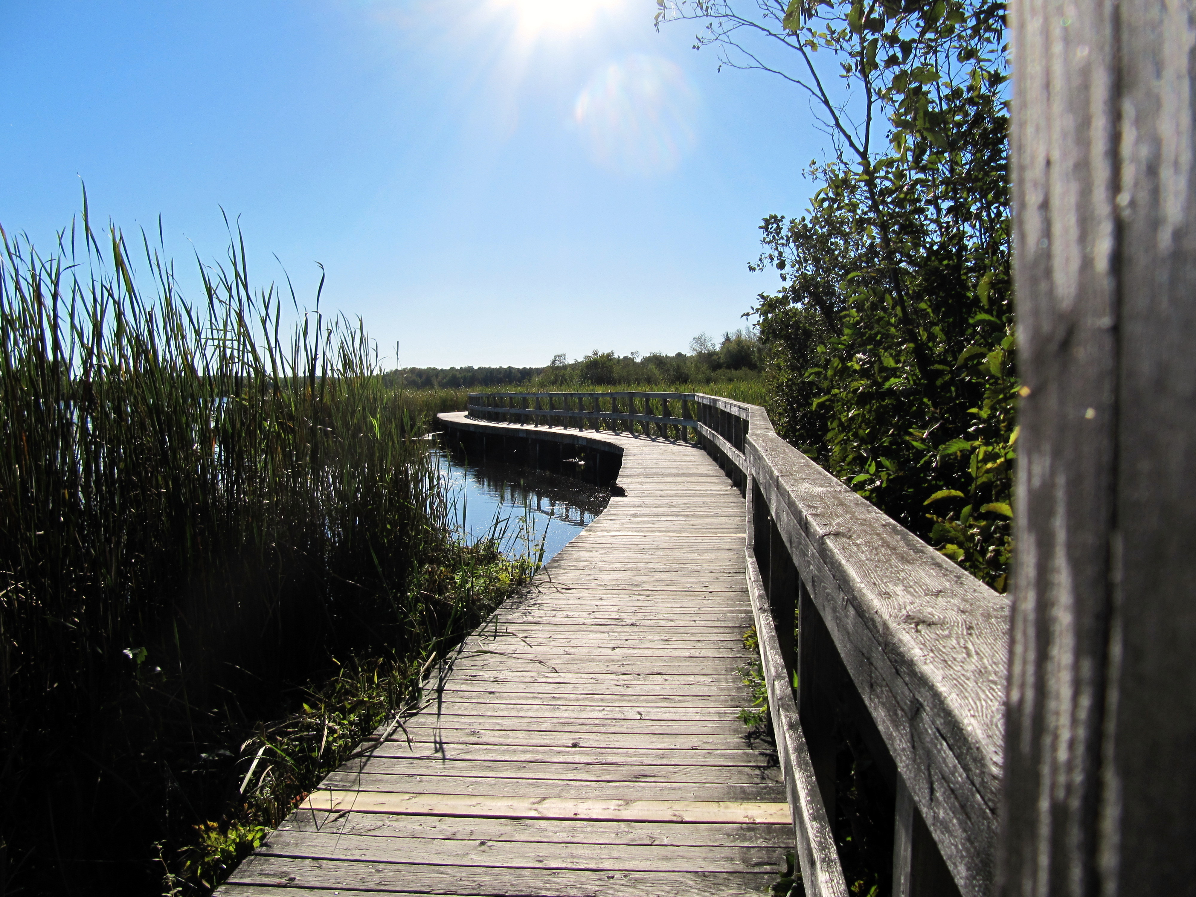 Photo prise au Centre d'Interprétation de la nature du lac Boivin de Granby (Québec). Sentier du marécage.